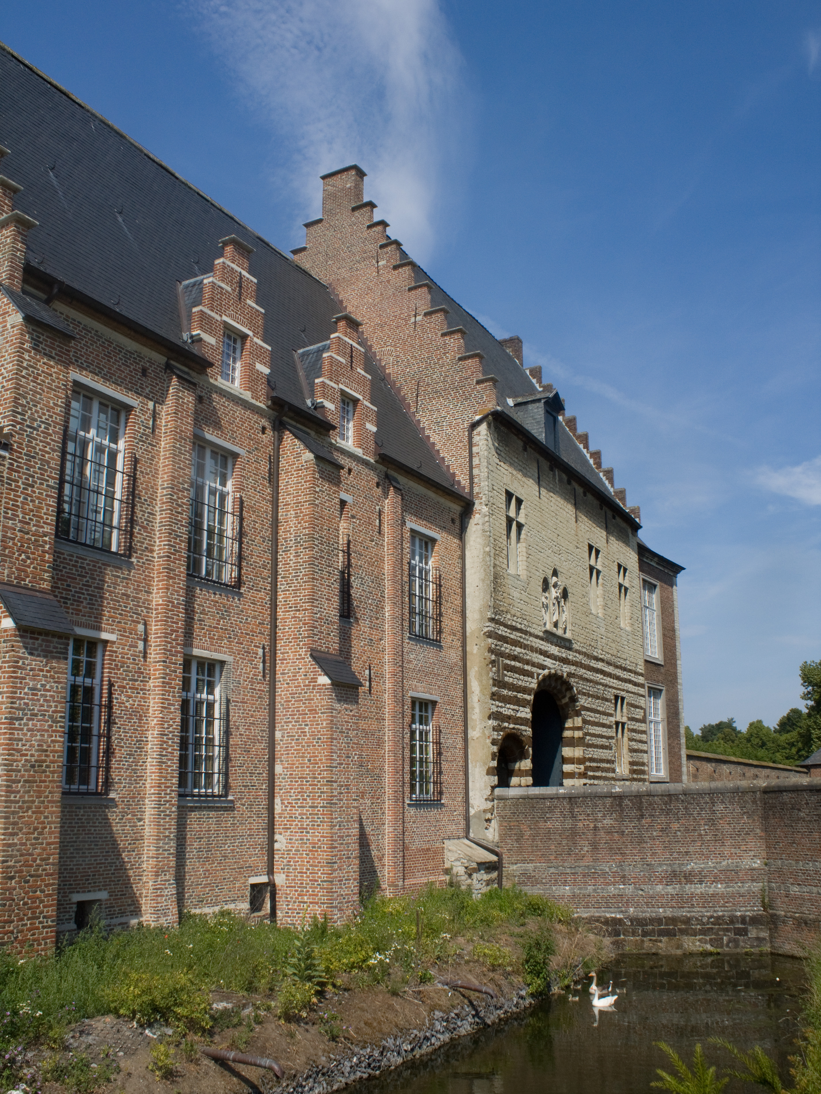 Abdij Tongerlo, Poort